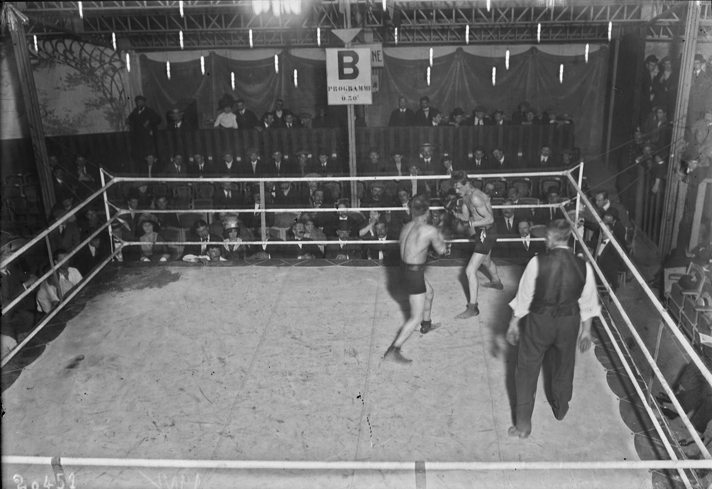 Match Eugène Criqui contre Robert Dastillon, 11-5-12, Wonderland (boxe), Paris